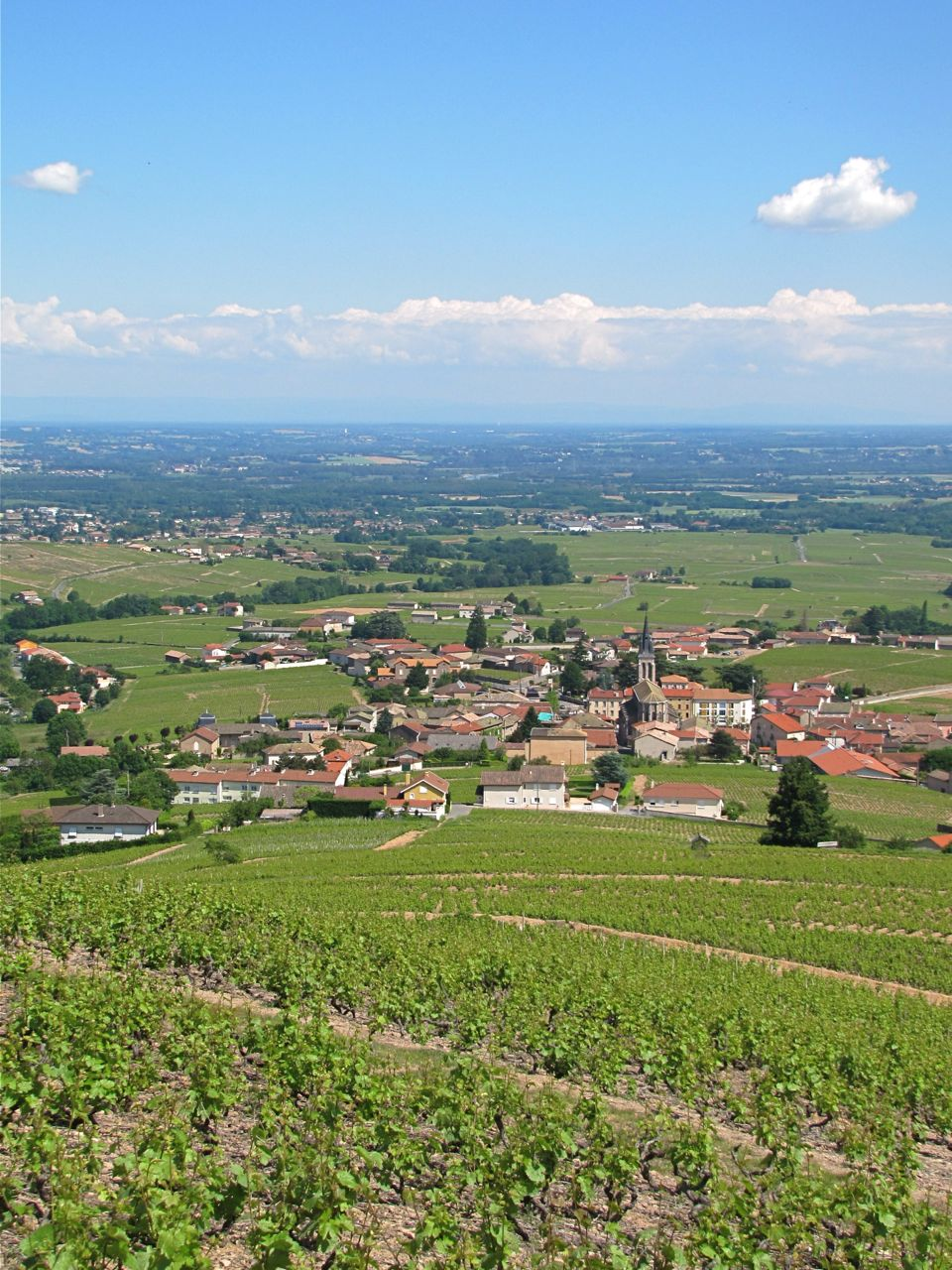 Vue de la ville de Fleurie, Rhône, France, le 28 mai 2012 depuis la Madonne.